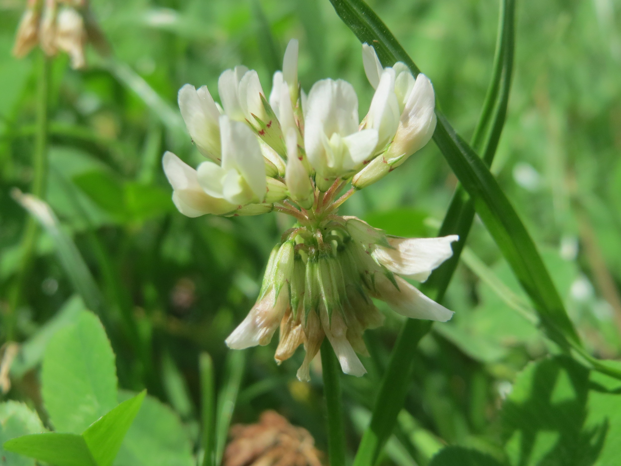 Weiß-Klee (Trifolium repens) in Oftersheim